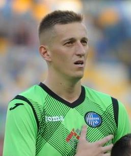 Сергій Літовченко - футболіст Олімпіка (Донецьк)